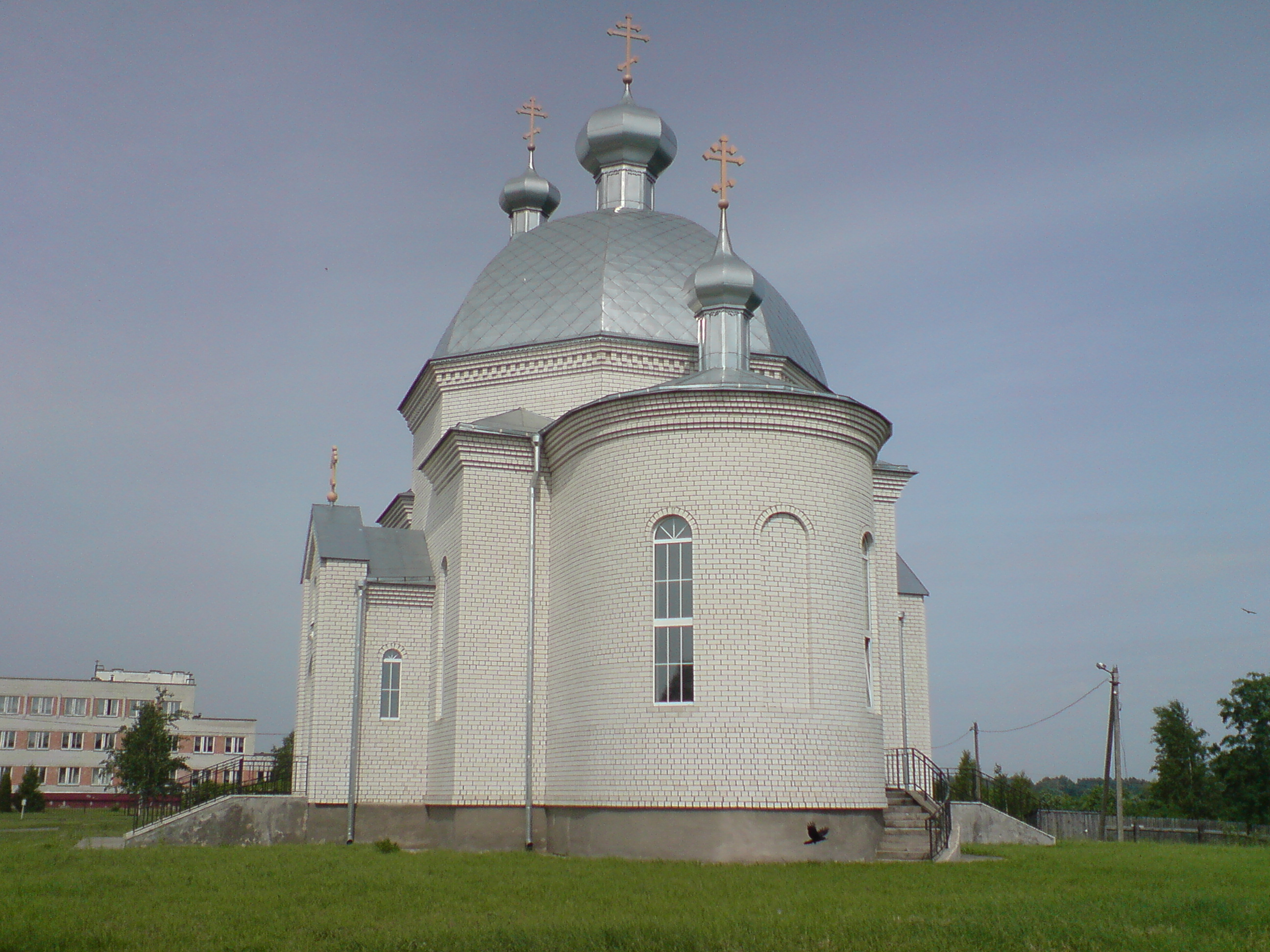 Церковь, в которую редко кто заходит.